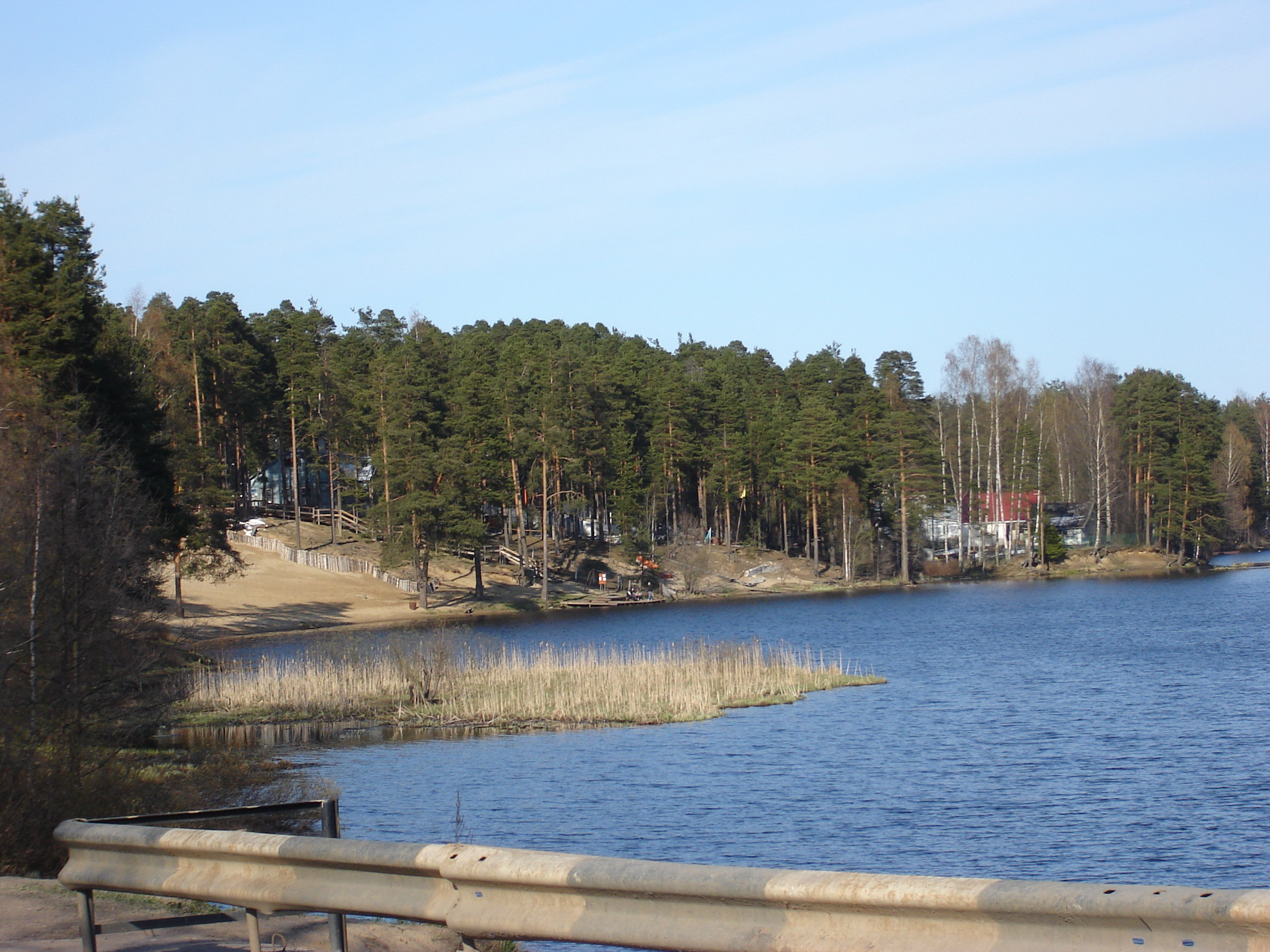 Озеро Рощинское